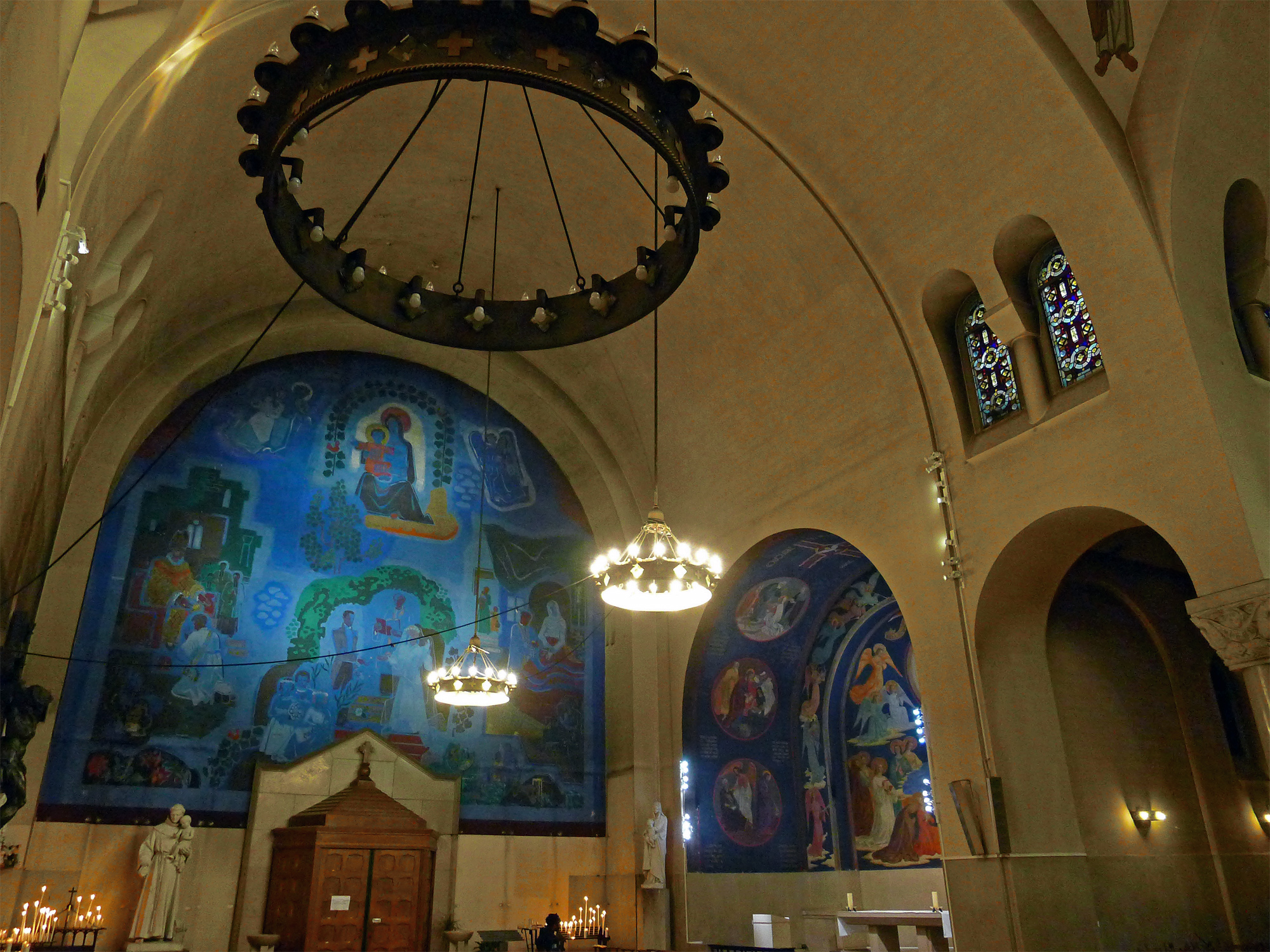 Église Saint-Ferdinand-des-Ternes (chapelle de la Vierge), transept gauche. La fresque de Pauline Peugniez représente le sacrement de l'ordination, le sacrement du mariage et l'extrême-onction - Paris XVIIe